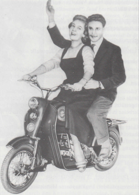 Das Lohner-Moped Sissy. Weitere Informationen: Erstes Österr. Motorradmuseum-Sammlung Ehn in A-3751 Sigmundsherberg.